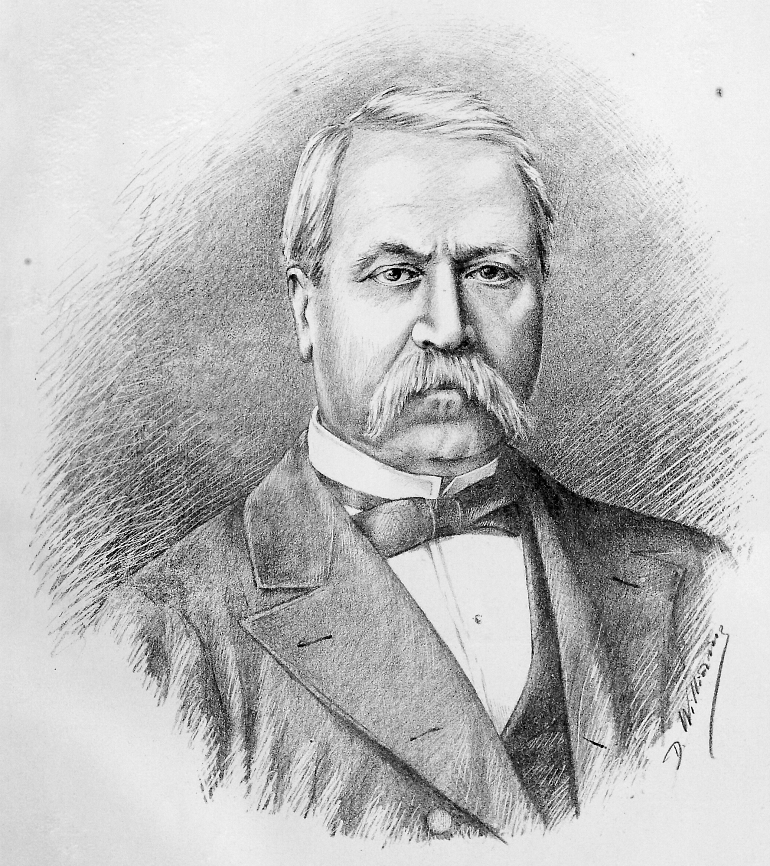 Portraits contemporains avec autographes : Politique, armée, clergé, letters, théatres & arts dessines & lithographies par D. William Bukarest, 1881 Lascar E. Catargi